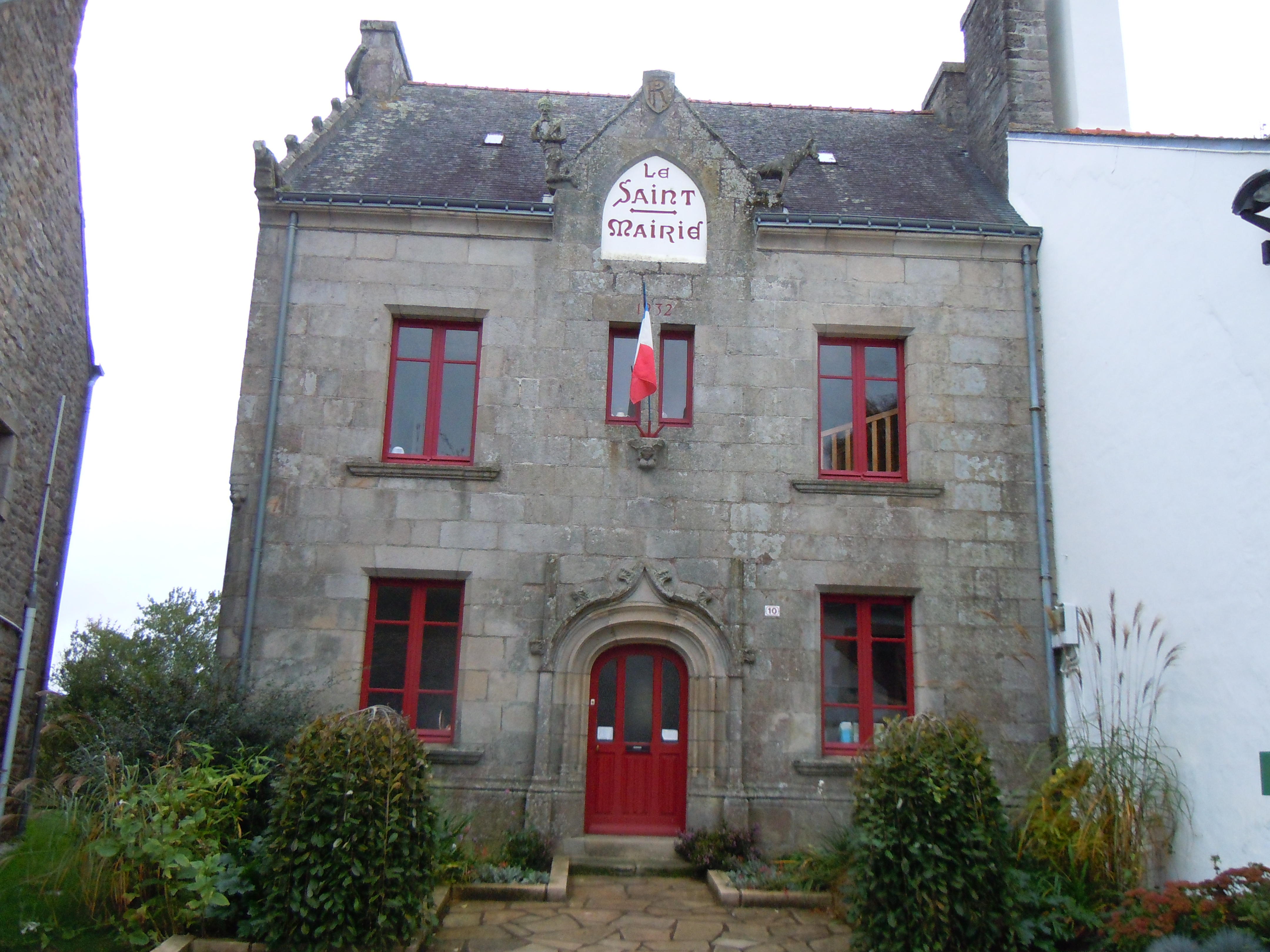 la mairie de la commune de Le Saint, département du Morbihan, France